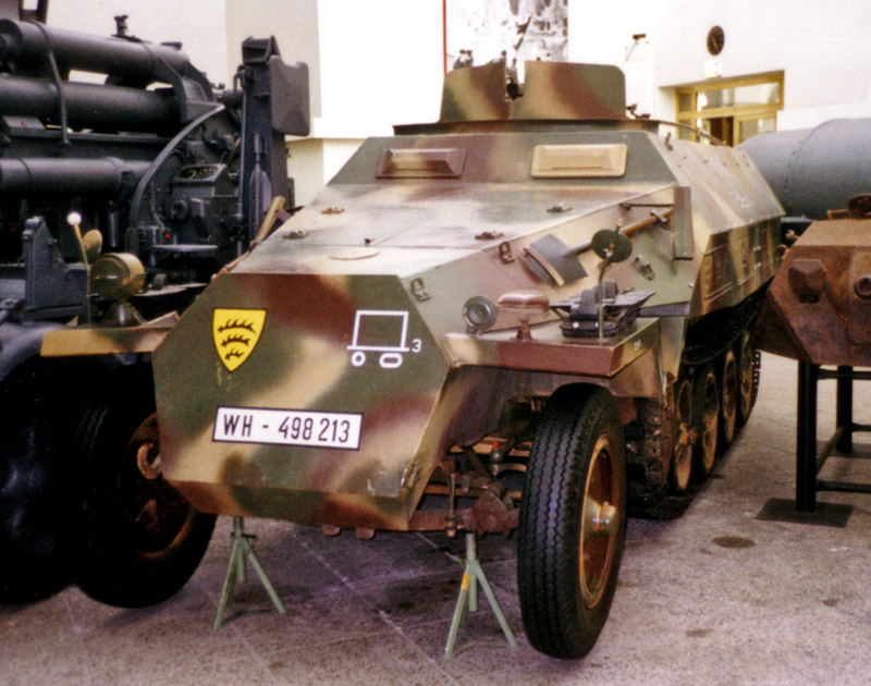 Schützenpanzerwagen Sd.Kfz. 251 Ausf.D, ausgestellt im Militärhistorischen Museum der Bundeswehr in Dresden